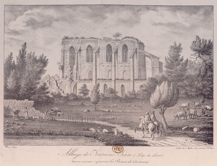 Représentation des vestiges de l'abbaye de Fontaine-Jean à Saint-Maurice-sur-Aveyron, Loiret, France